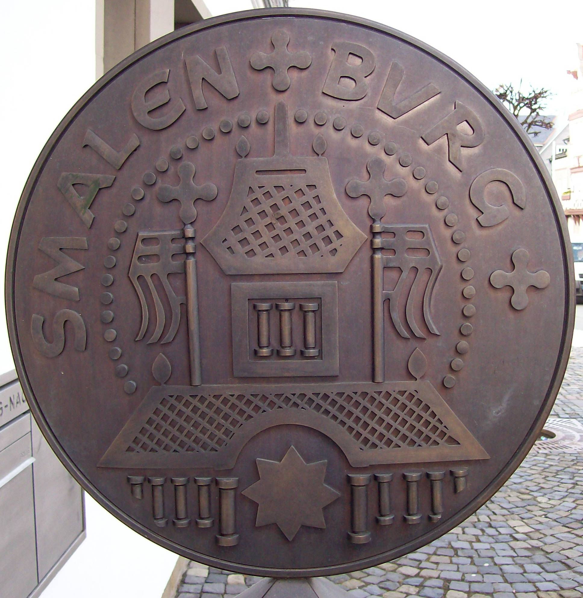 Stilisierte Nachbildung der Rückseite des mittelalterlichen Schmallenberger Pfennigs. Das Kunstwerk steht in Schmallenberg vor der Stadtsparkasse Schmallenberg (Germany).